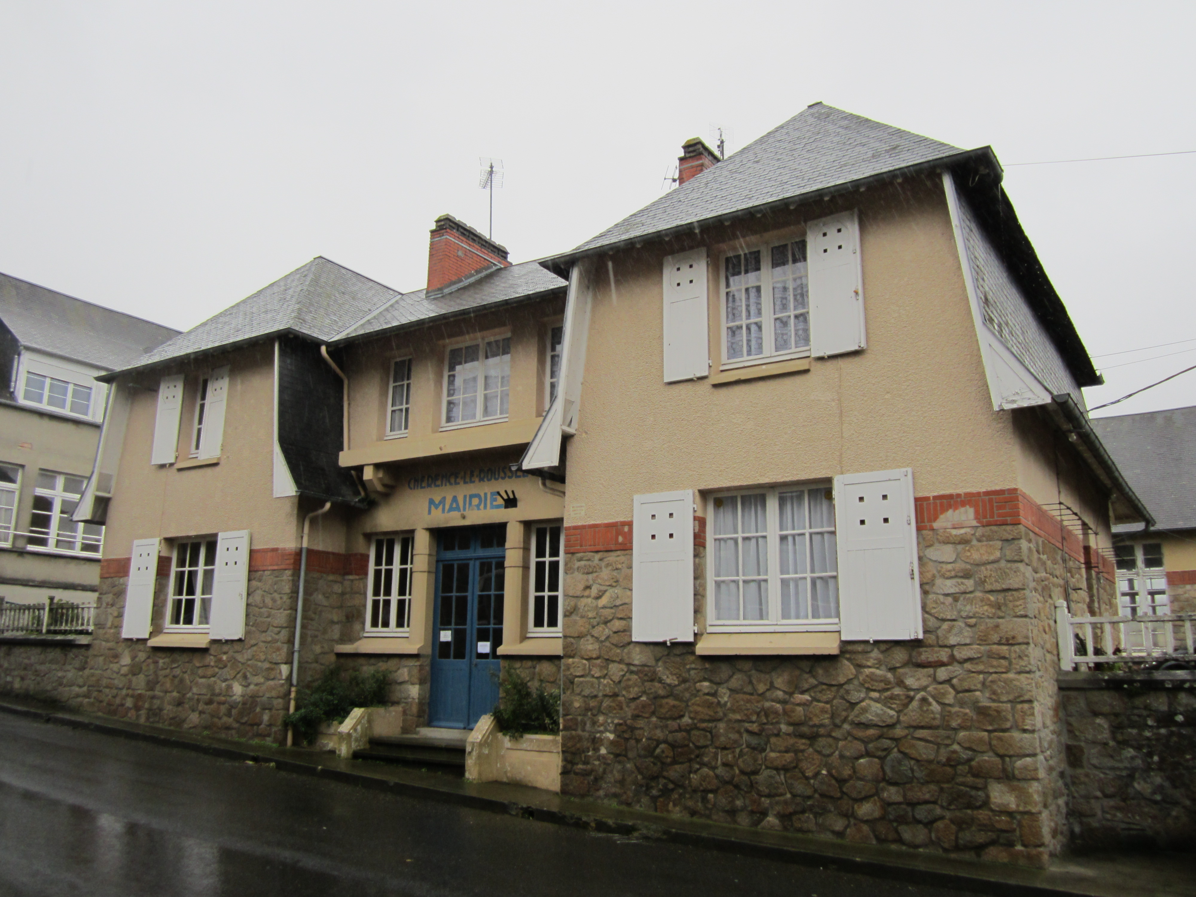 Chérencé-le-Roussel, Manche